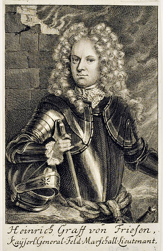 Julius Heinrich von Friesen (1657-1706), kaiserlicher Feldmarschall-Leutnant